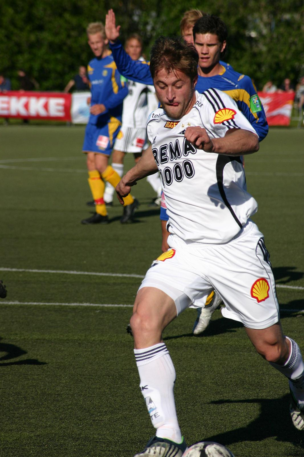 Norsk (bokmål): Bilde av Dario Zahora, tatt under treningskamp mot Strindheim.